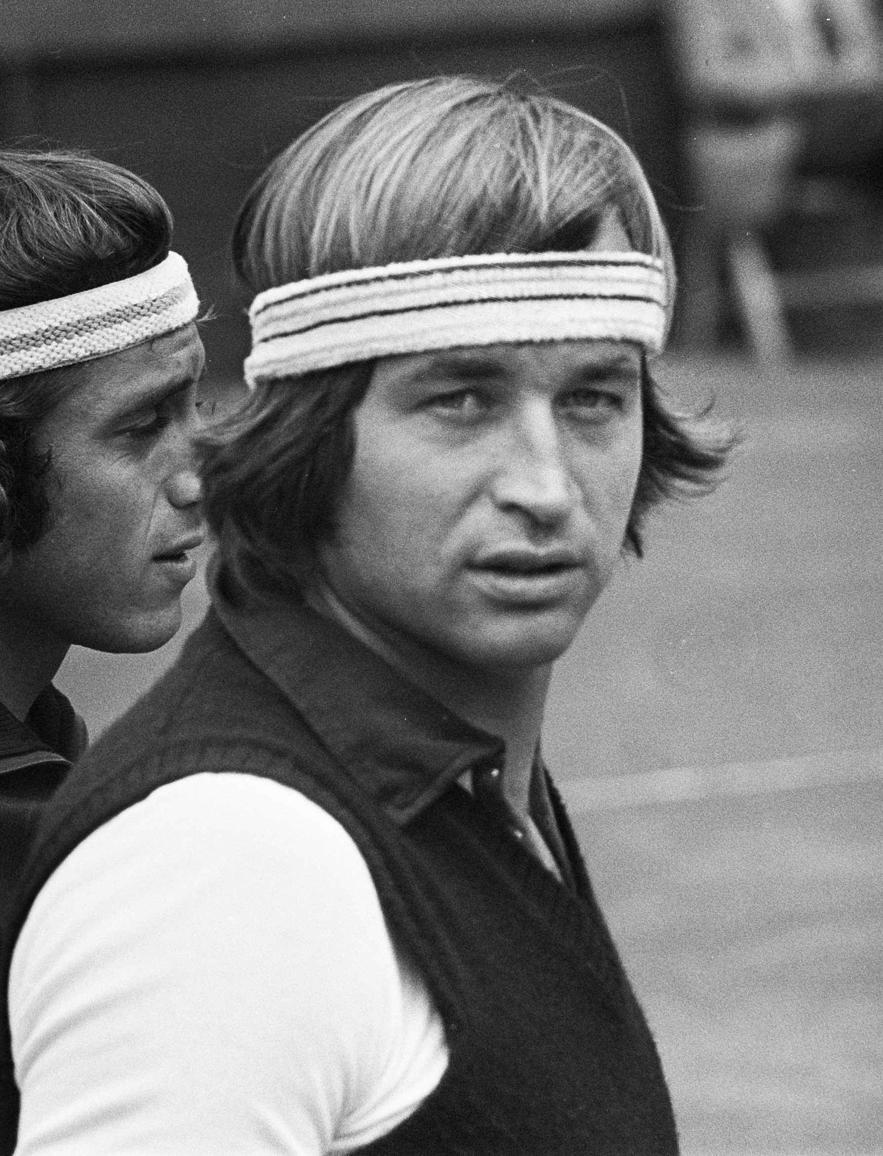 Internationale tenniskampioenschappen 1975 op het Melkhuisje in Hilversum. Vilas (l) en Fassbender tijdens de wissel